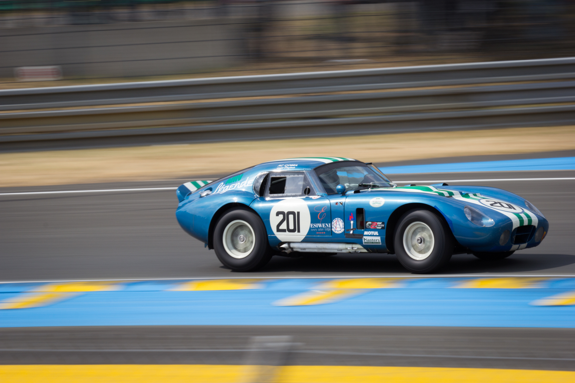 Le Mans Legend 2015 Driver: Ludovic Caron